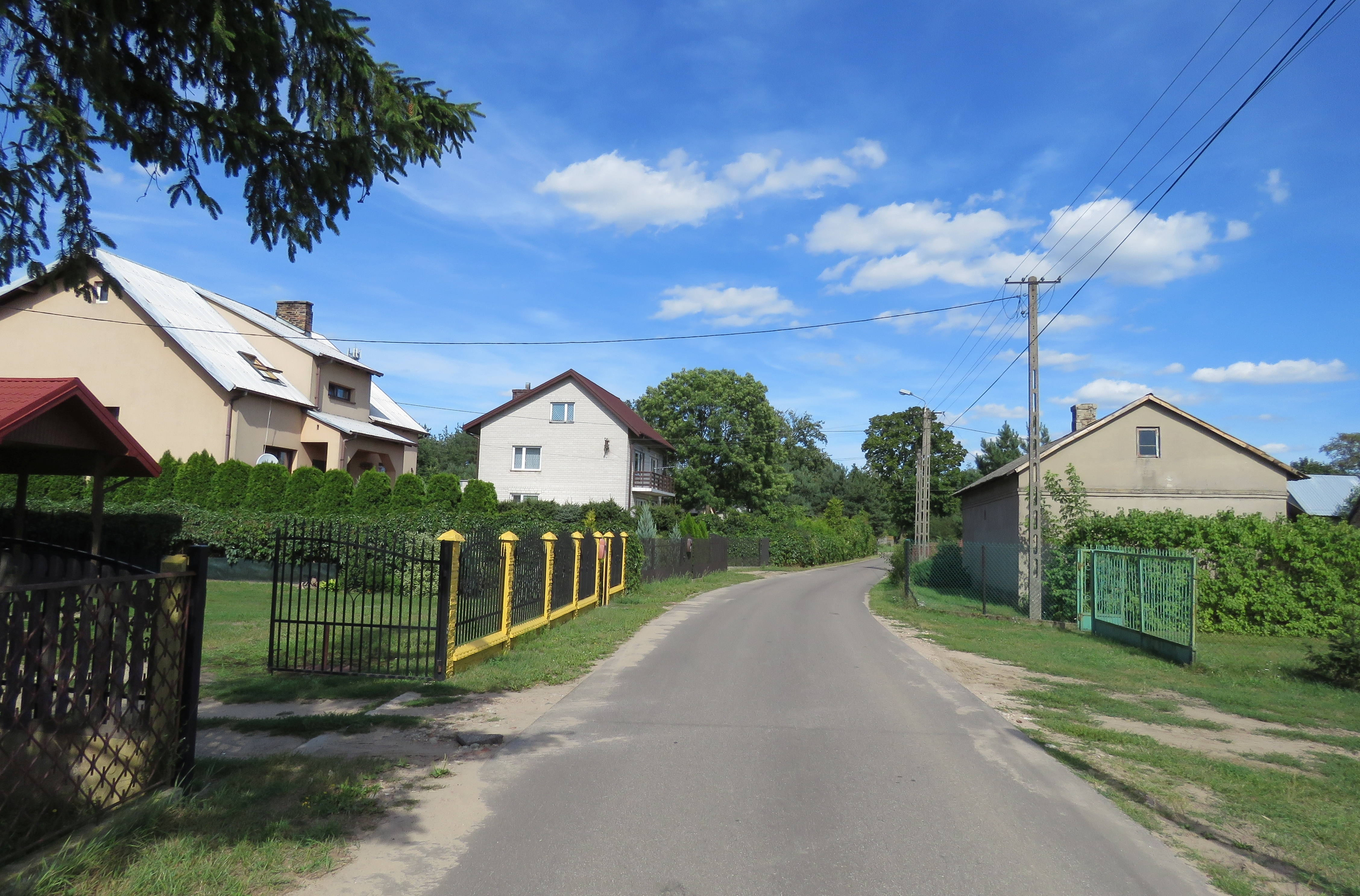 MICHAŁÓW